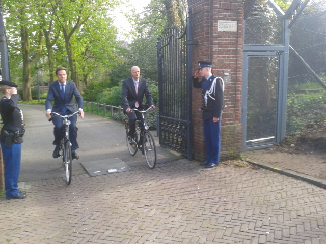 Minister-President Mark Rutte en VVD-fractievoorzitter verlaten het Catshuis op de zaterdag dat het sluiten van een akkoord mislukt.